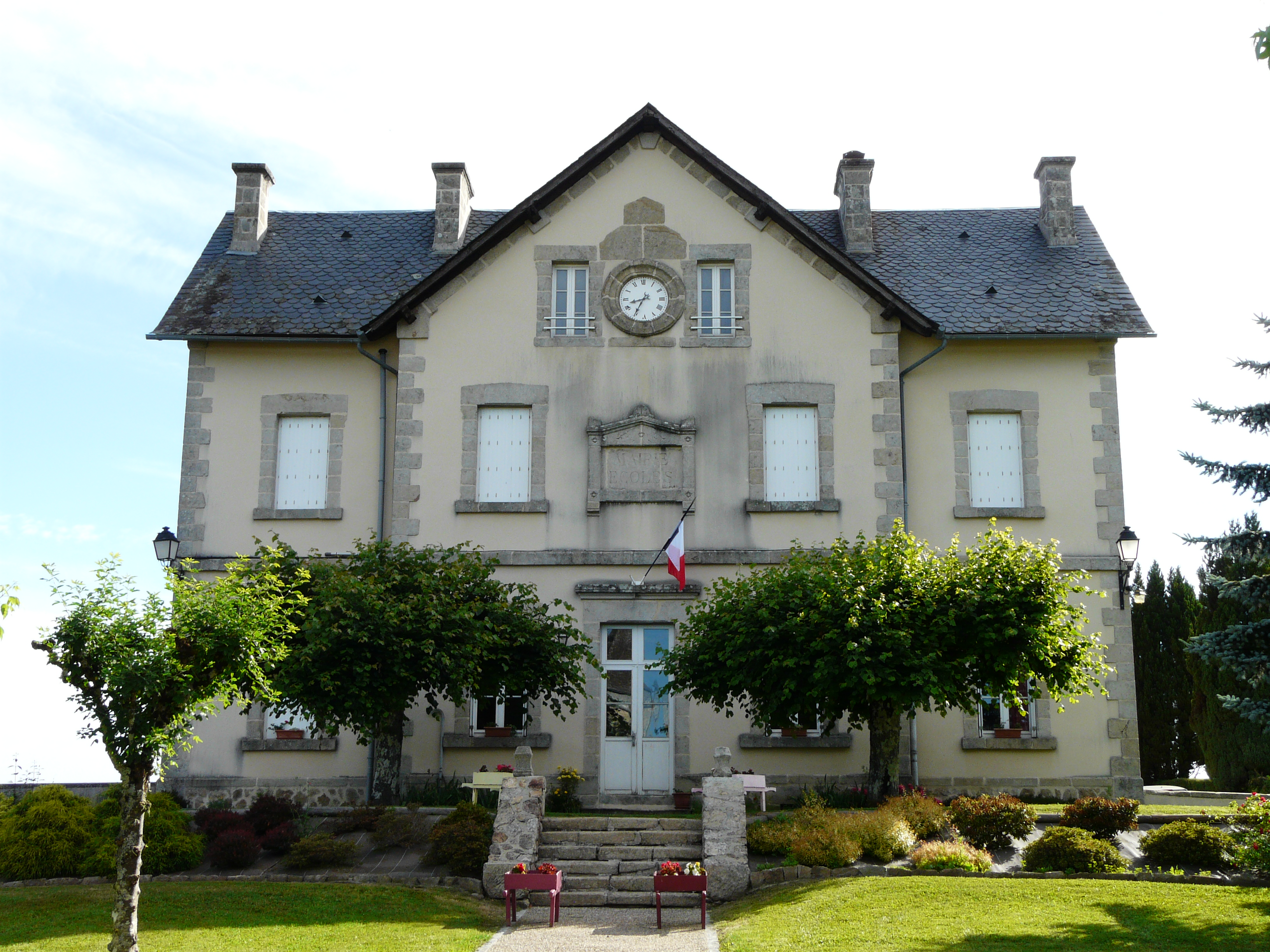 La mairie de Sexcles, Corrèze, France.